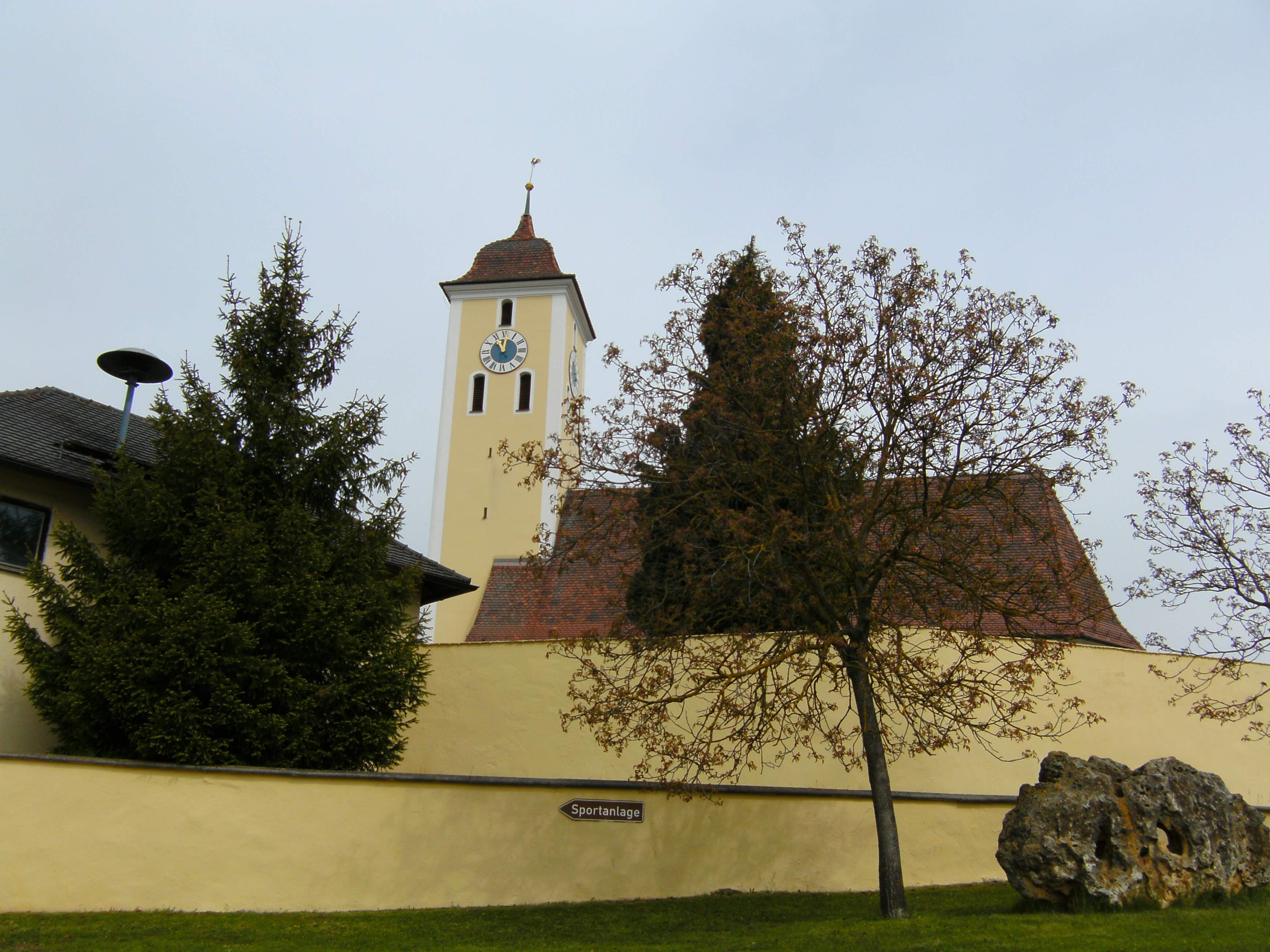 Kirche in Irfersorf, einem Gemeindeteil der Stadt Beilngries im Landkreis Eichstätt in Bayern